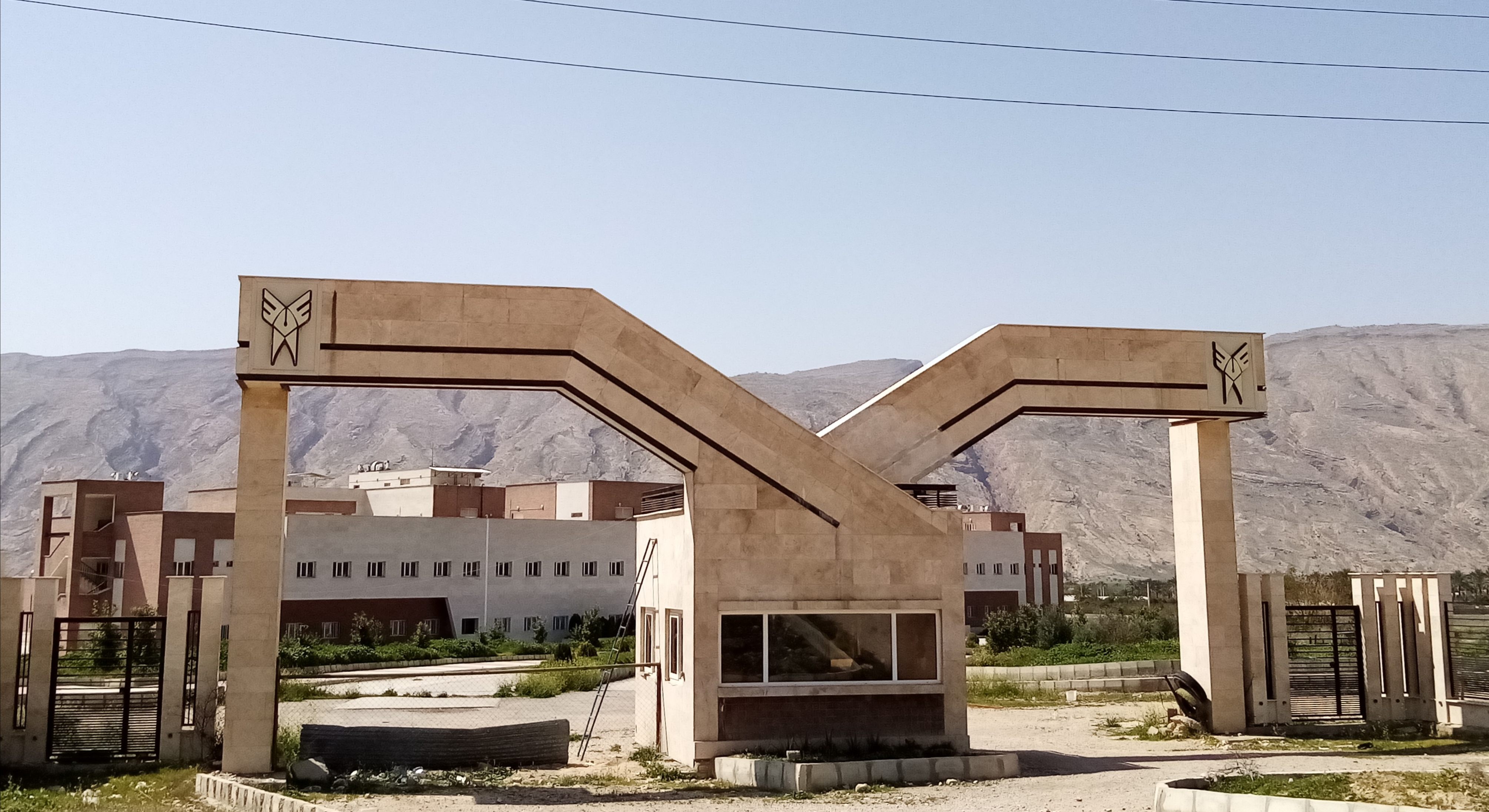 مجتبی بهره‌دار